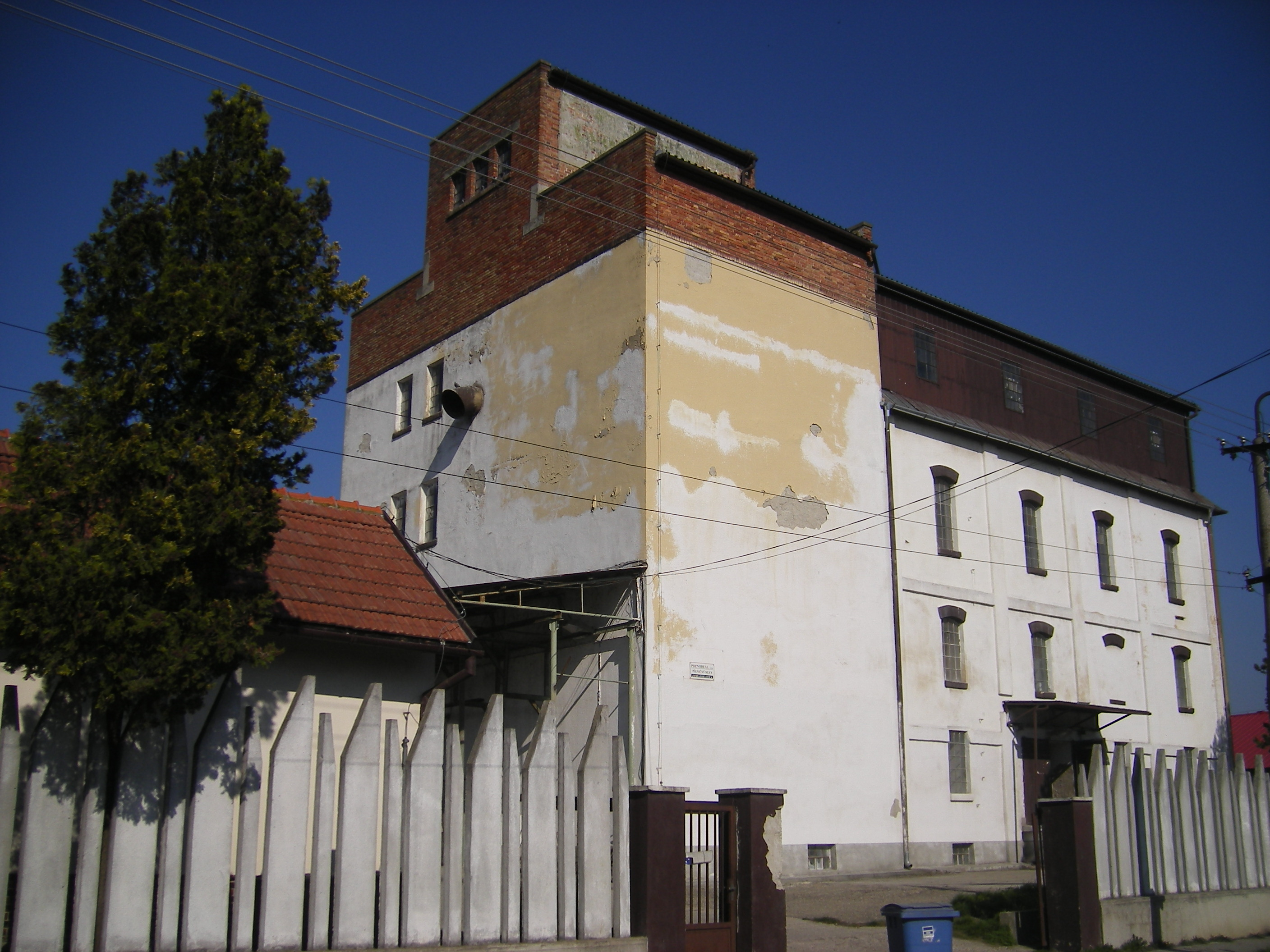 Nemesócsa, az 1910-ben épült hengermalom